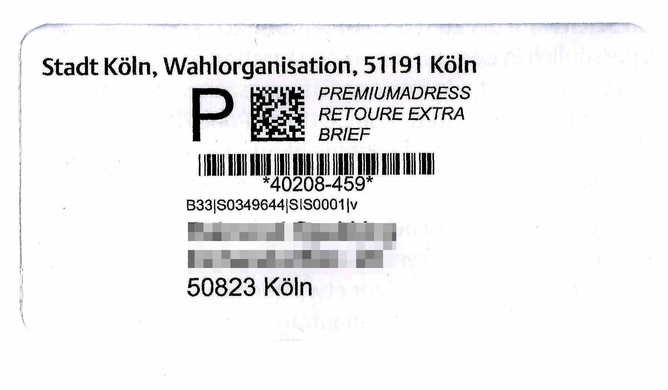 Fensterbriefumschlag, DV-Freimachung, Vorausverfügung: Premiumadress Retoure Extra Brief